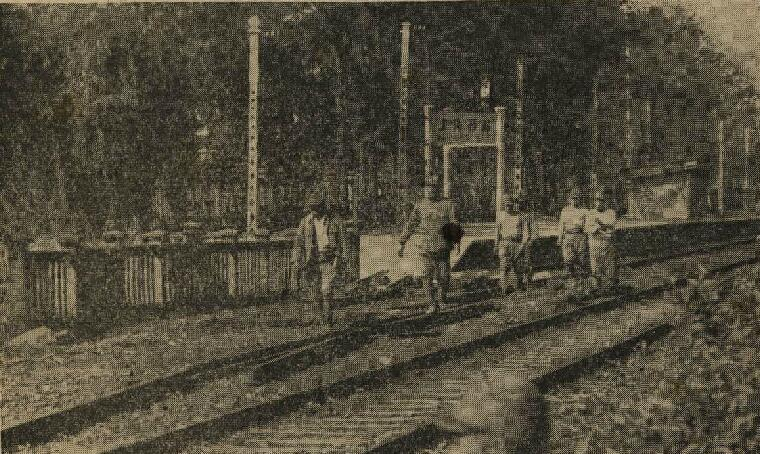 题名： 日軍佔領上海西區後，在上海西站之日軍：[照片] 文献来源： 《中日战事史迹》 出版时间： 1937 年 卷期(页)： [ 1937年7月至1938年3月年刊 ，190页 ] 中图分类号： K265